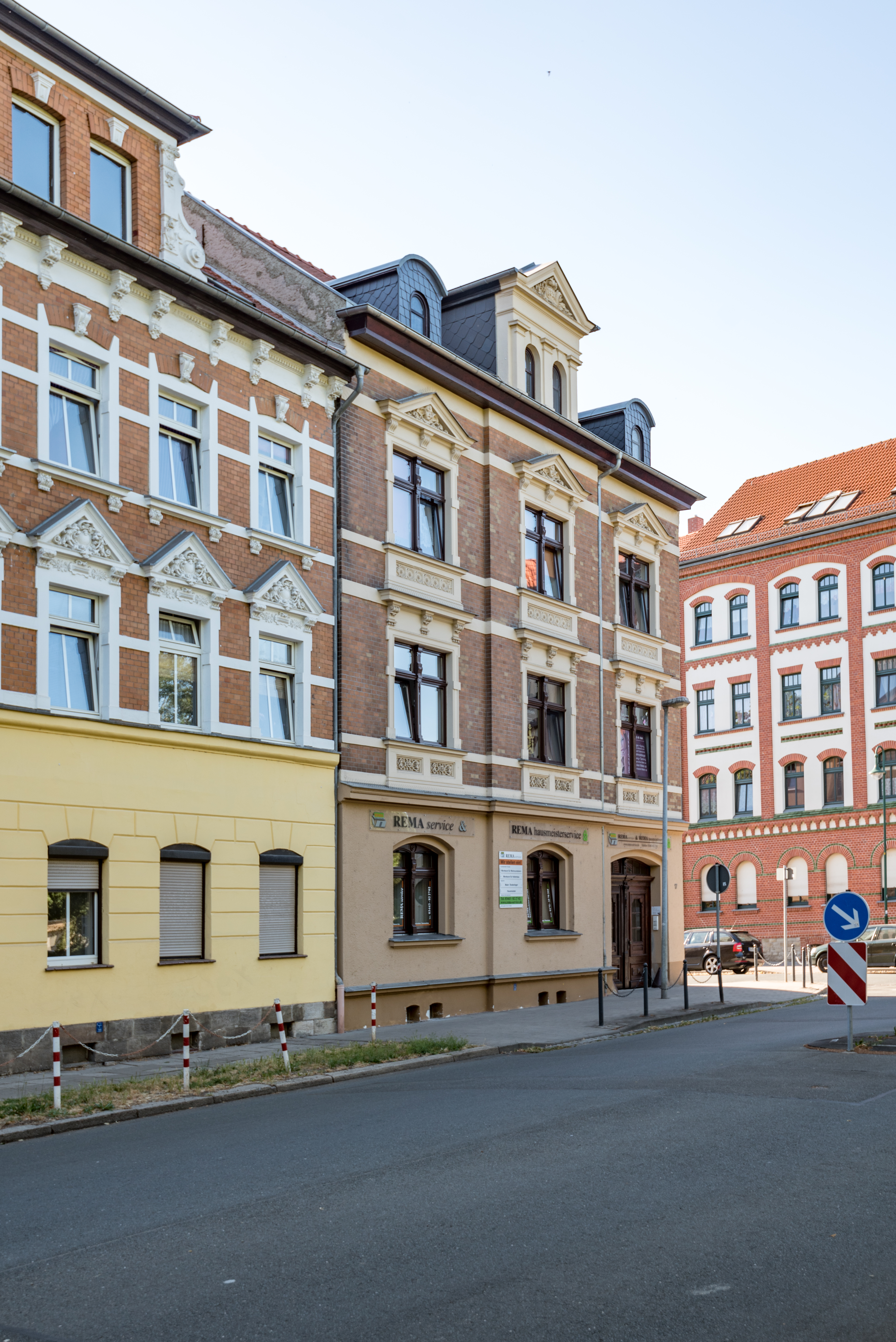 Weißenfels, Große Deichstraße 17